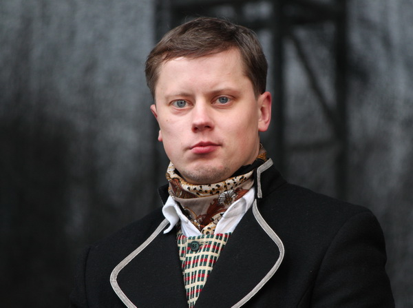 Kauno miesto meras Andrius Kupčinskas, 2011 m.